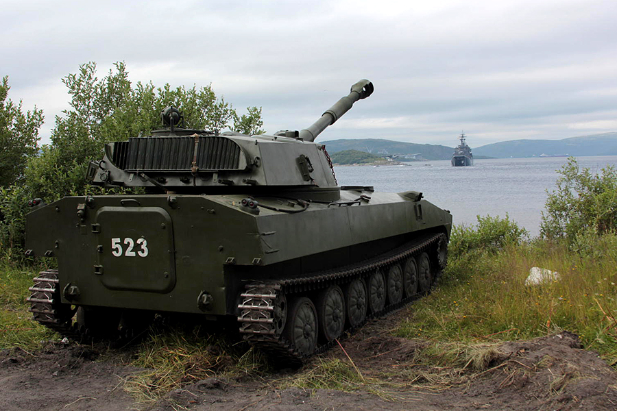 Морские пехотинцы Северного флота отработали высадку морского десанта с БДК на бронетранспортерах.